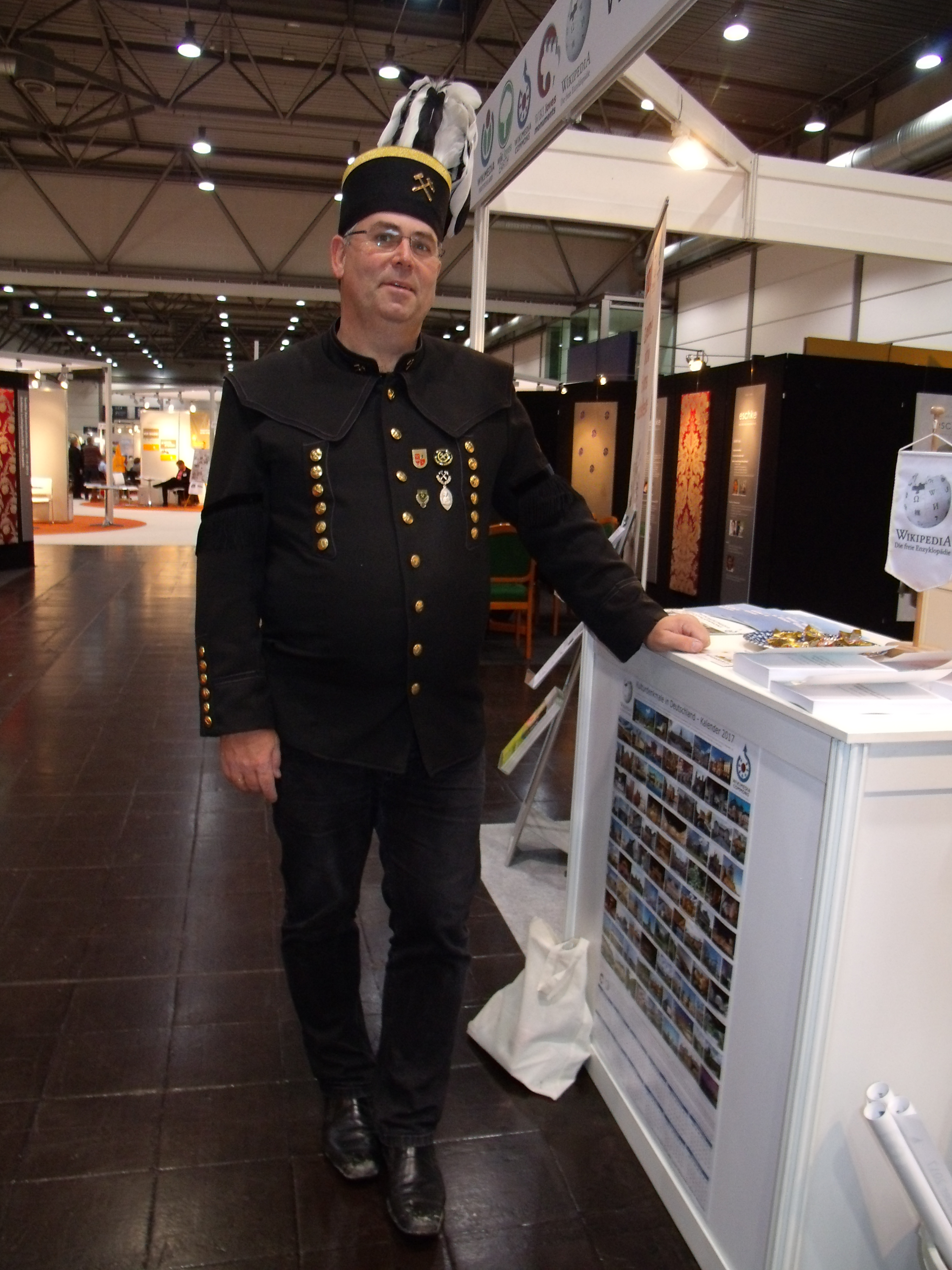 Rüdersdorfer Kalkbruch Bergmann im Habit am Messestand der Wikimedia e.V., Berlin auf der "denkmal" 2016 in Leipzig.